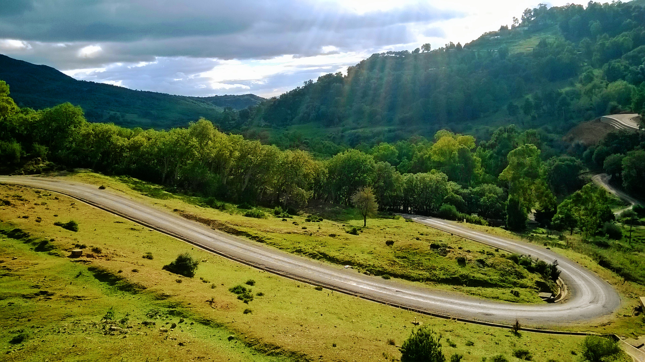 Photo prise au cours d'une randonnée à Ain Drahem